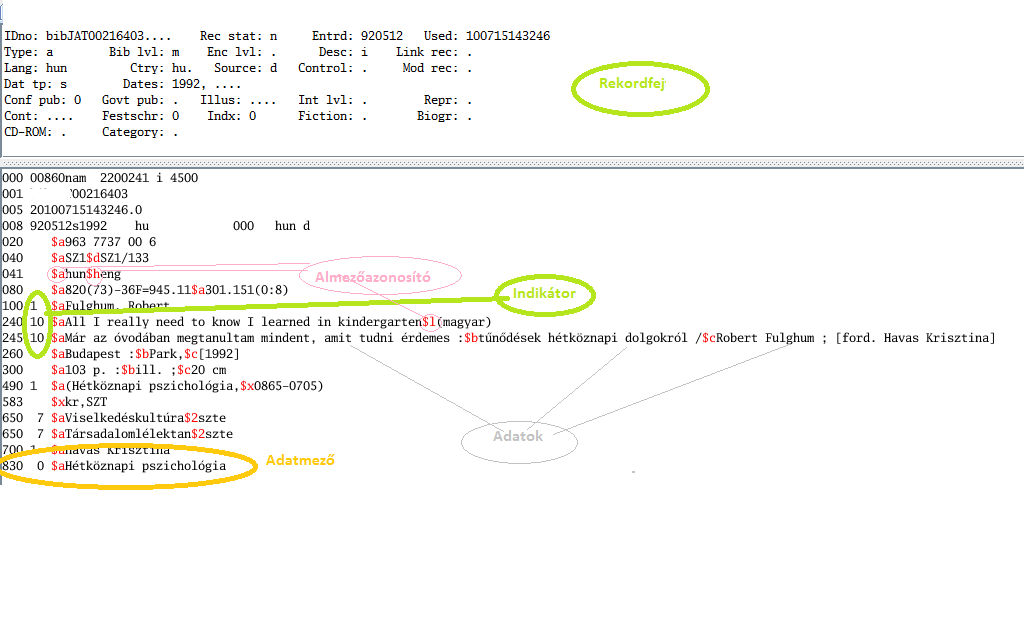 A MARC formátum formai összetevői